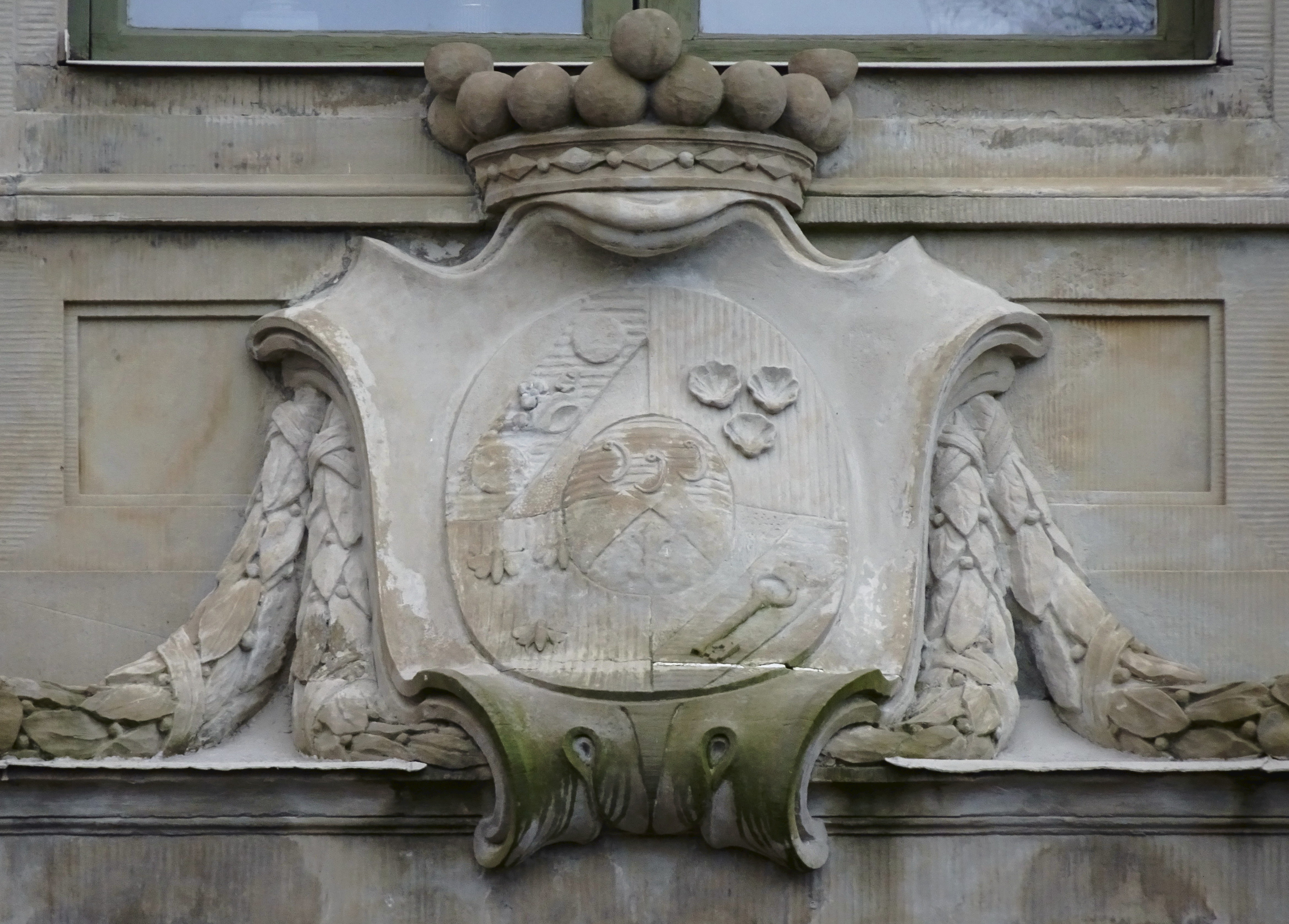 Sturehov vapen över huvudentrén